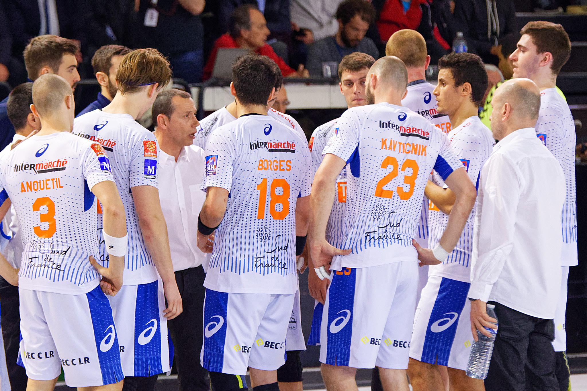 Rencontre du championnat de LNH entre l'US Ivry et Montpellier. A Ivry, le 17 mars 2016.